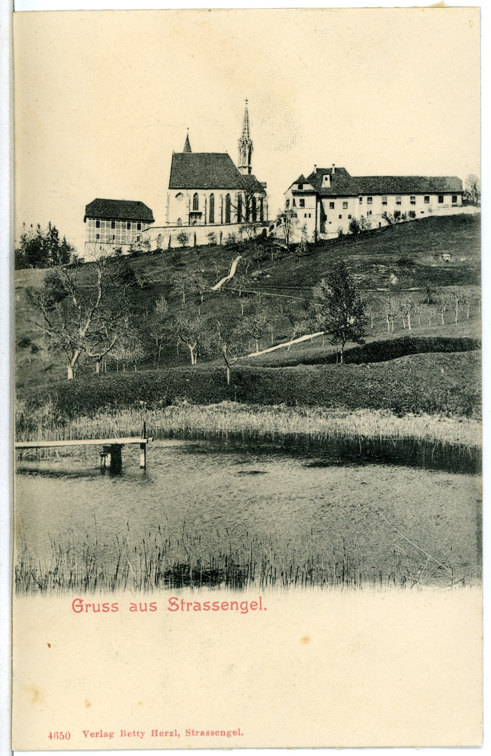 Straßengel; Blick auf Straßenengel This postcard is from publisher Brück & Sohn in Meißen ( postcard has a unique number 04650 and is available in a higher resolution at the publisher. This images was uploaded in a cooperation project between Wikipedians and the publisher.